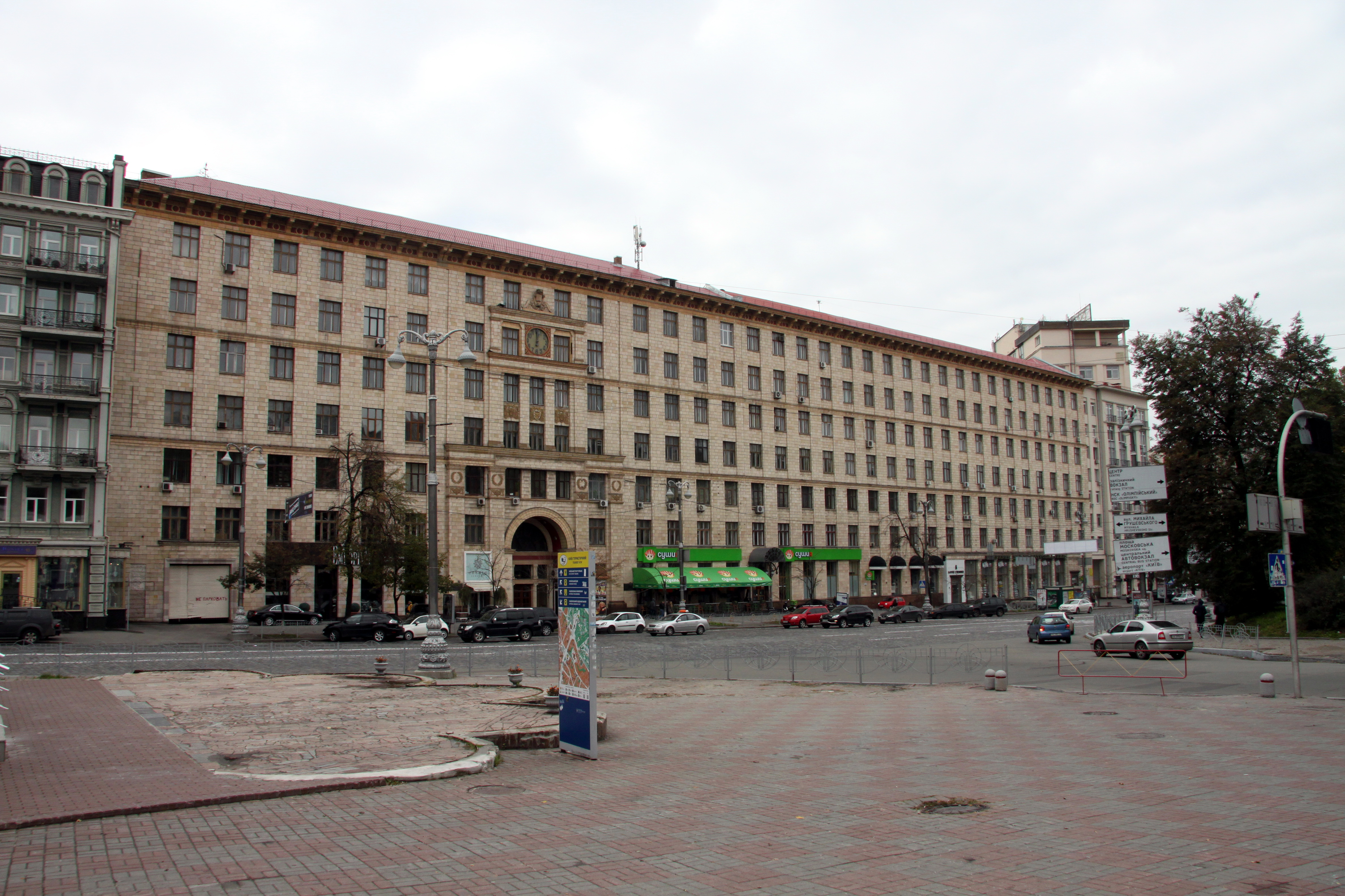 Будинок Секції суспільних наук НАН України, де у 1960–1981 рр. працювали вчені-академіки: І. К. Білодід, мовознавець, В. М. Корецький, юрист; Б. М. Бабій, правознавець; історики: І. О. Гуржій, Ю. Ю. Кондуфор, А. Д. Скаба, М. І. Супруненко та ін., Київ, Грушевського Михайла вул., 4